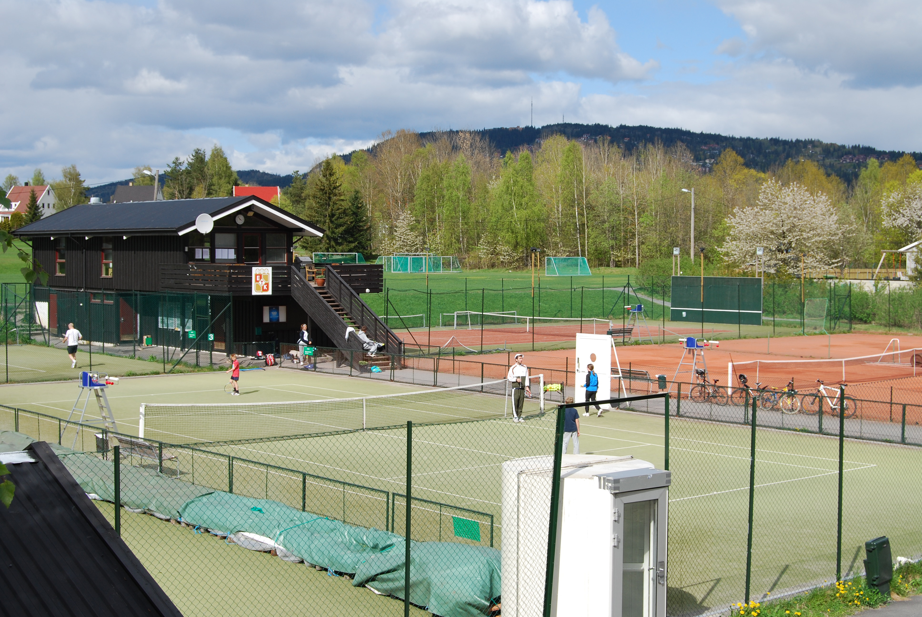 Korty tenisowe Eiksmarka (Oslo) 25. 05. 2009 r.